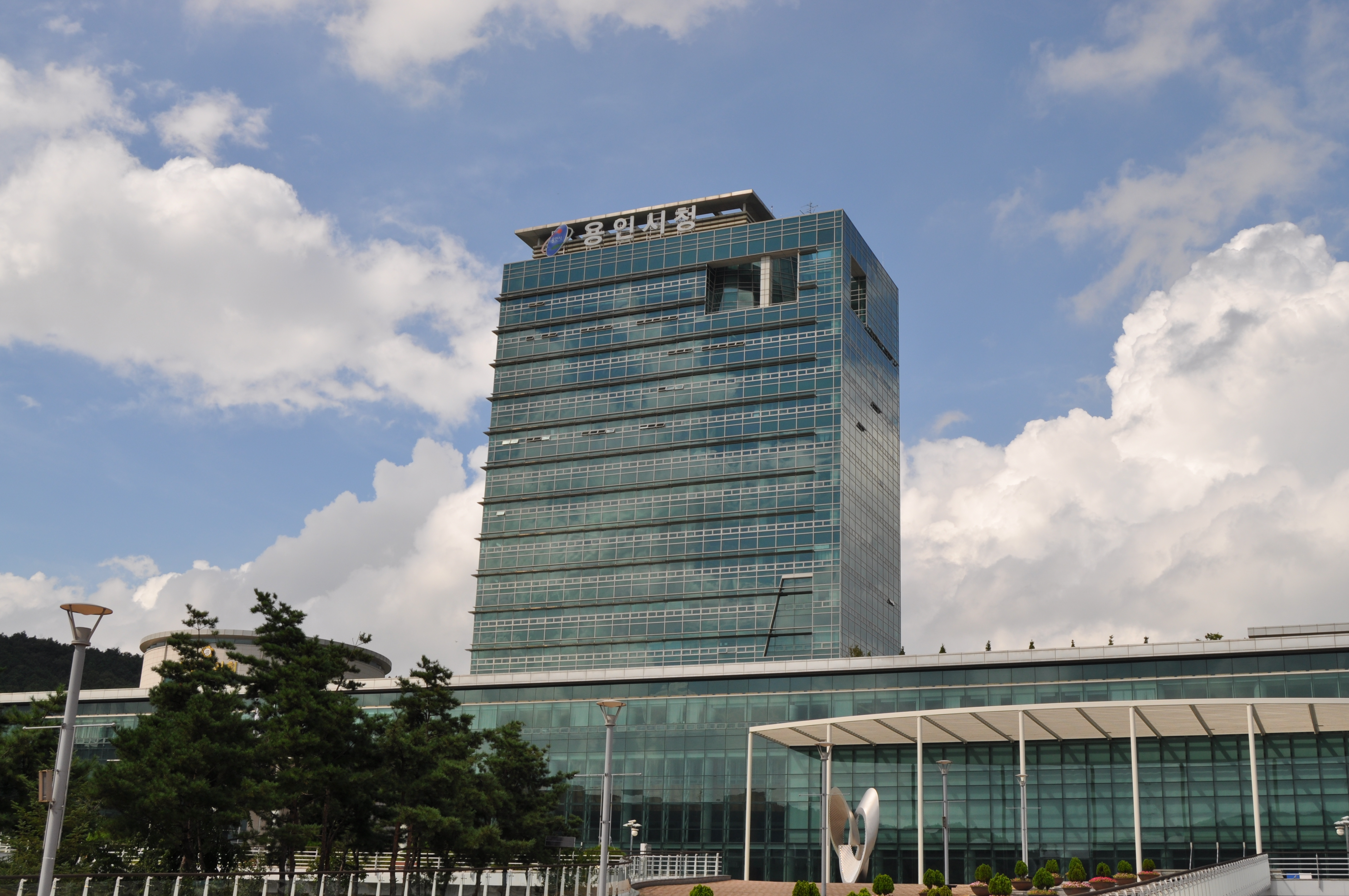 용인시청. 용인시 처인구 소재